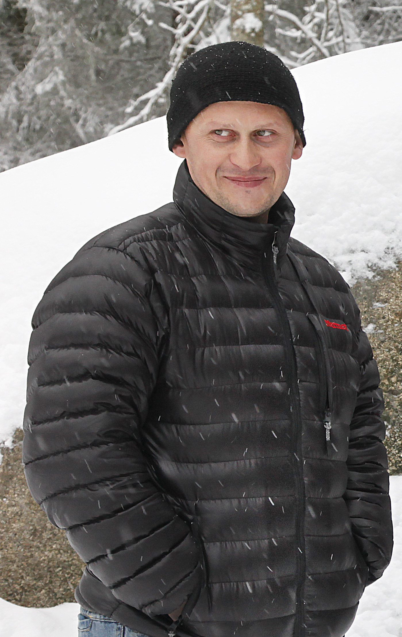 Saulius Vilius